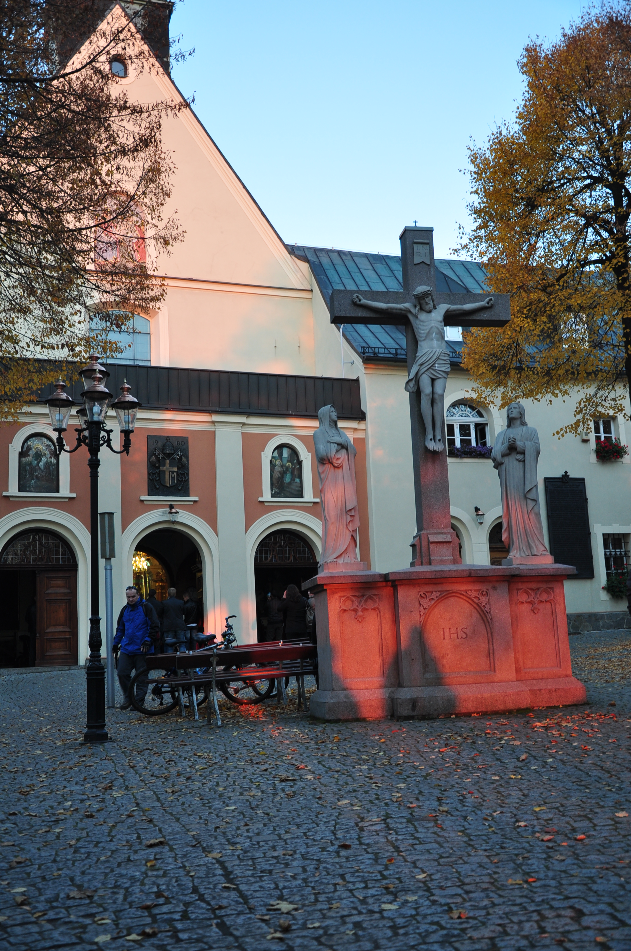 Góra Świętej Anny, kościół p.w. św. Anny, 1480, 1665, XVIII, XIX